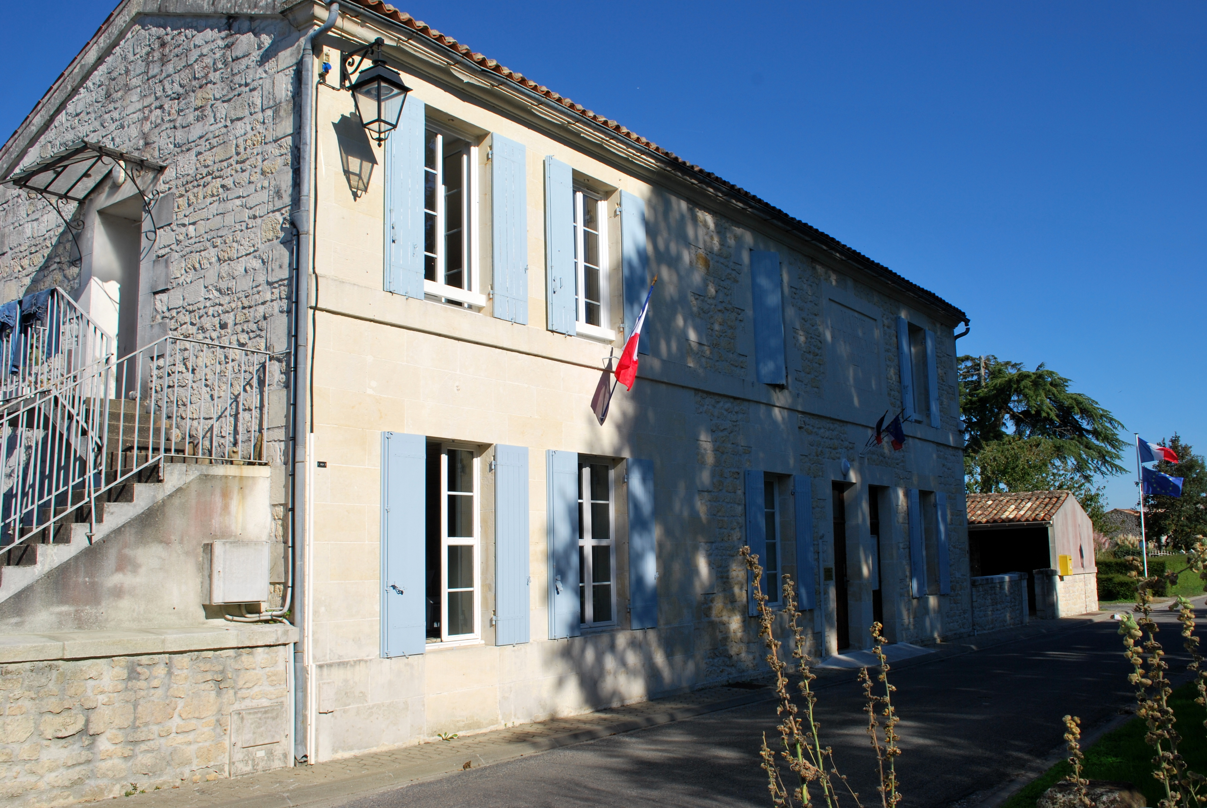 Saint-Quantin-de-Rançanne